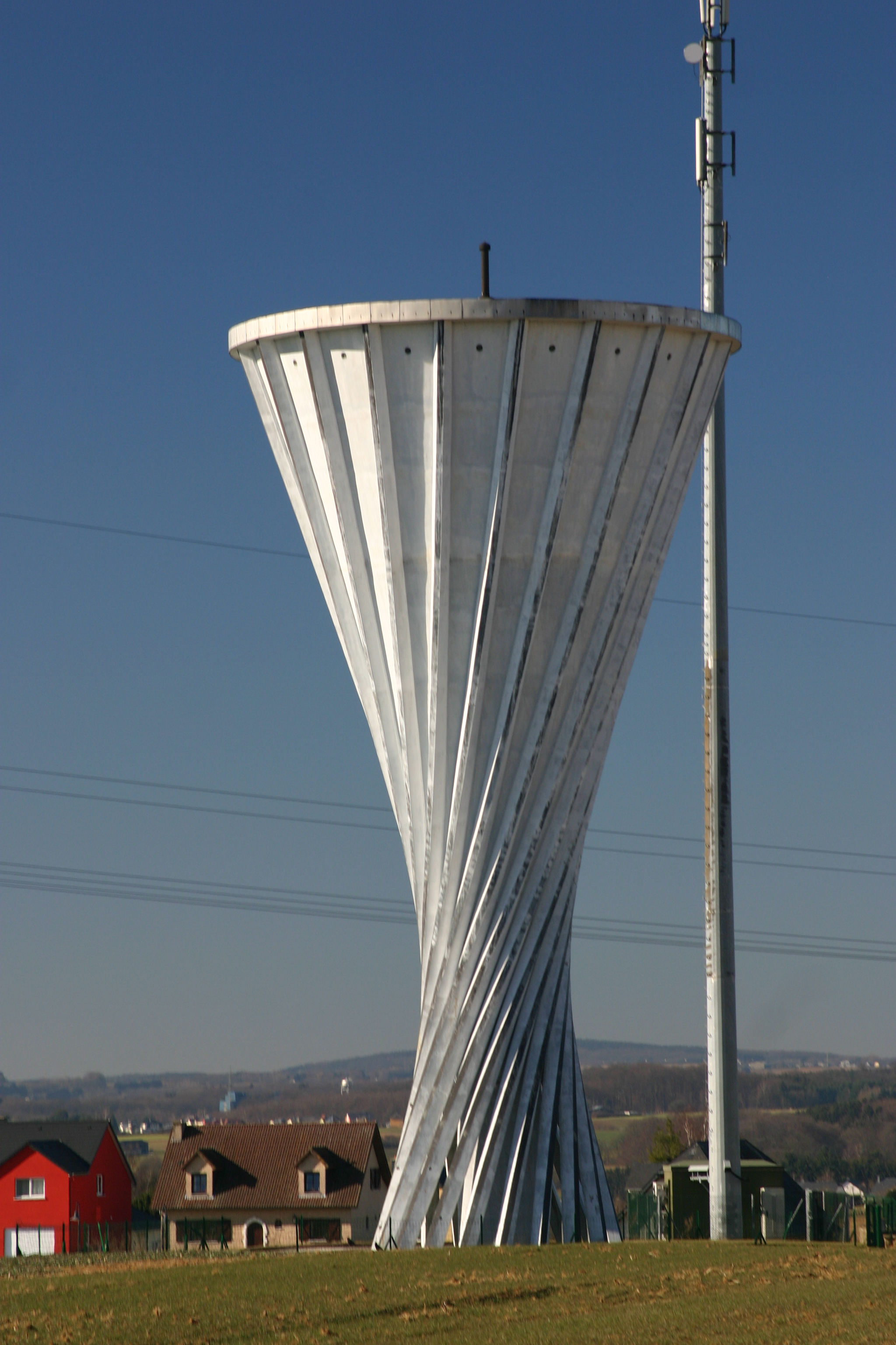 Waassertuerm vu Giewel.